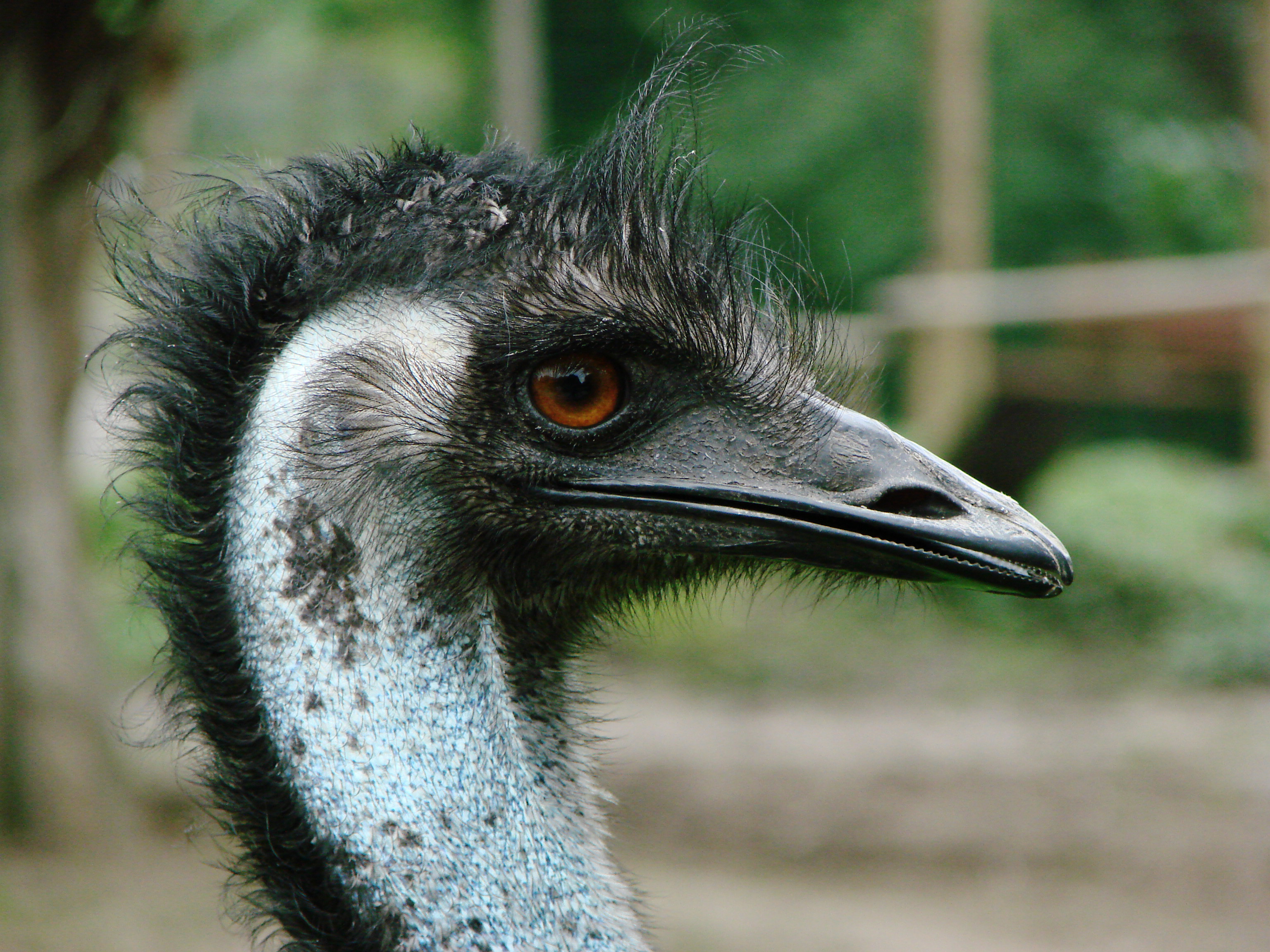 Emeu (Dromaius novaehollandiae).Zoo d'Amiens.